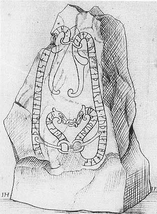 runestone